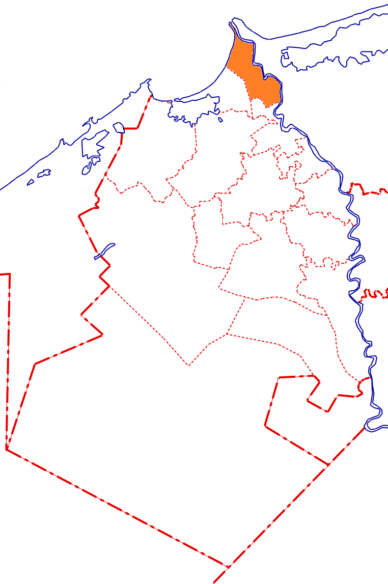 خريطة مركز رشيد بالنسبة لمحافظة البحيرة، مصر.